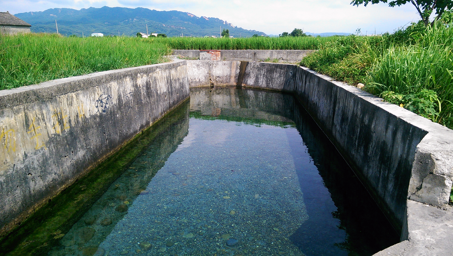 中文（台灣）: 大甲日南冷泉